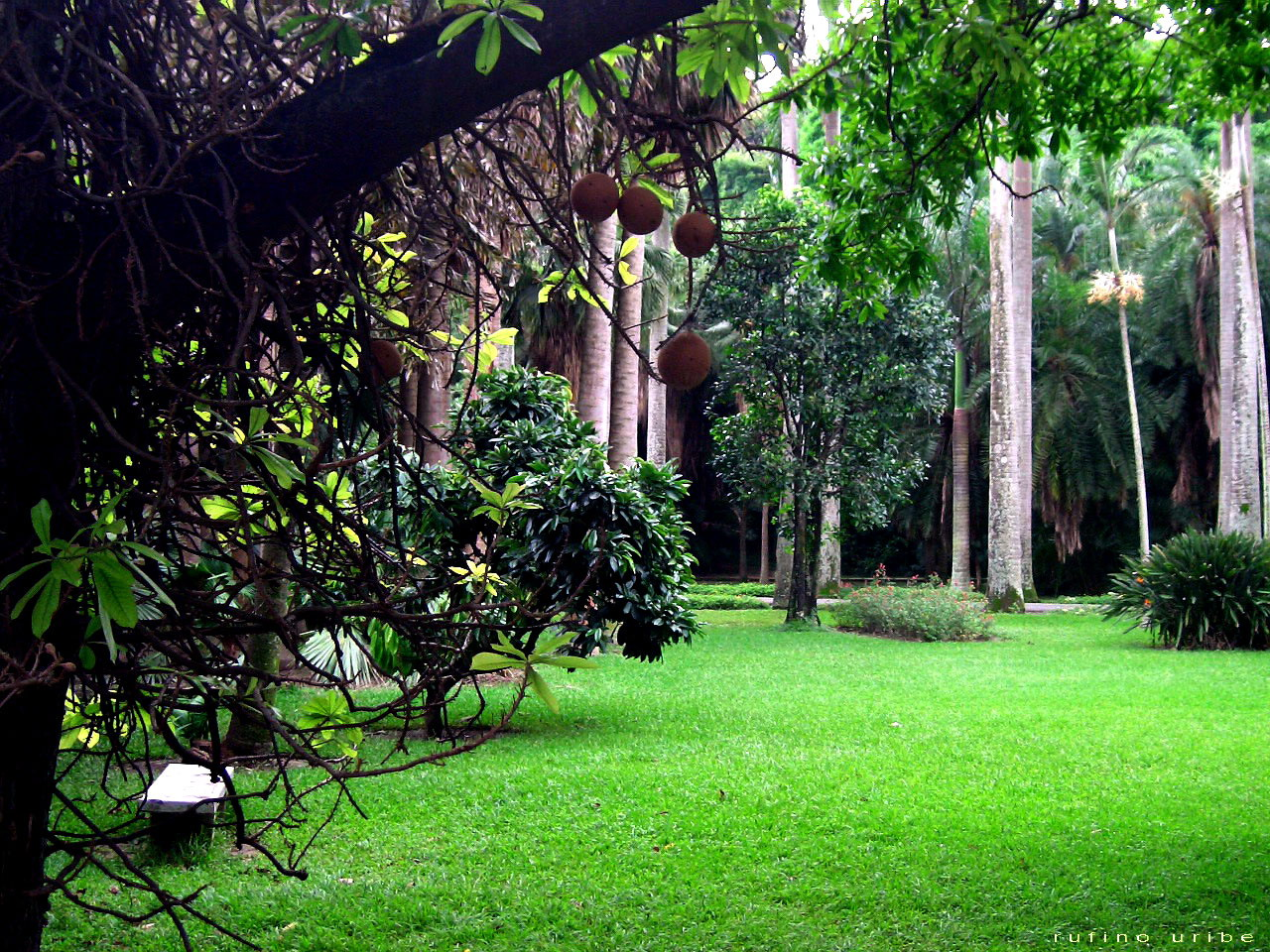 Tomada en el Jardín Botánico de Caracas